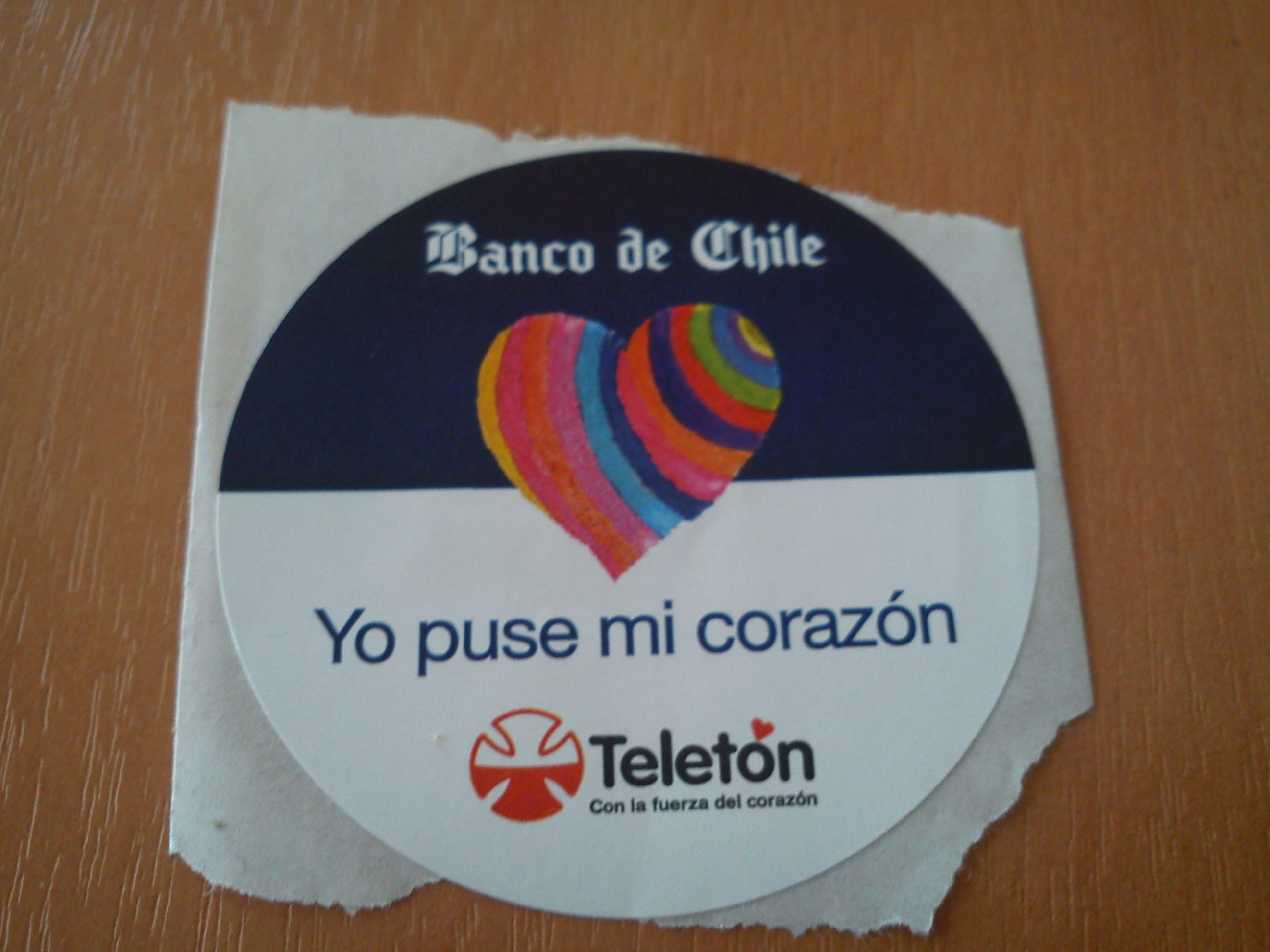 Calcomanía de la Teletón chilena de 2011.